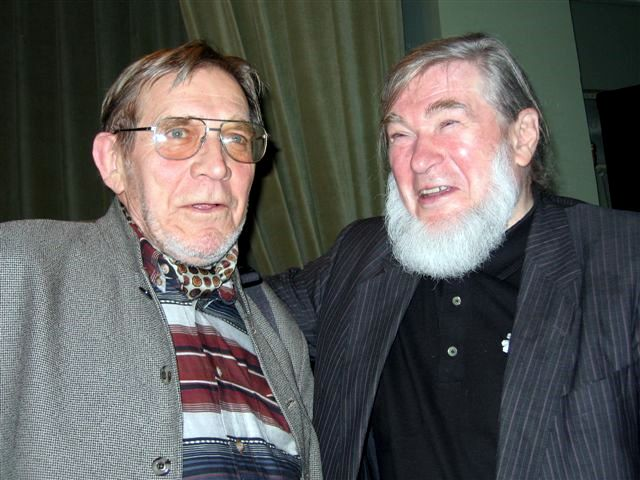 Marian Grześczak (1934-2010) - Polish poet, essayist and literary critic and Krzysztof Karasek (b. 1937), Polish poet.